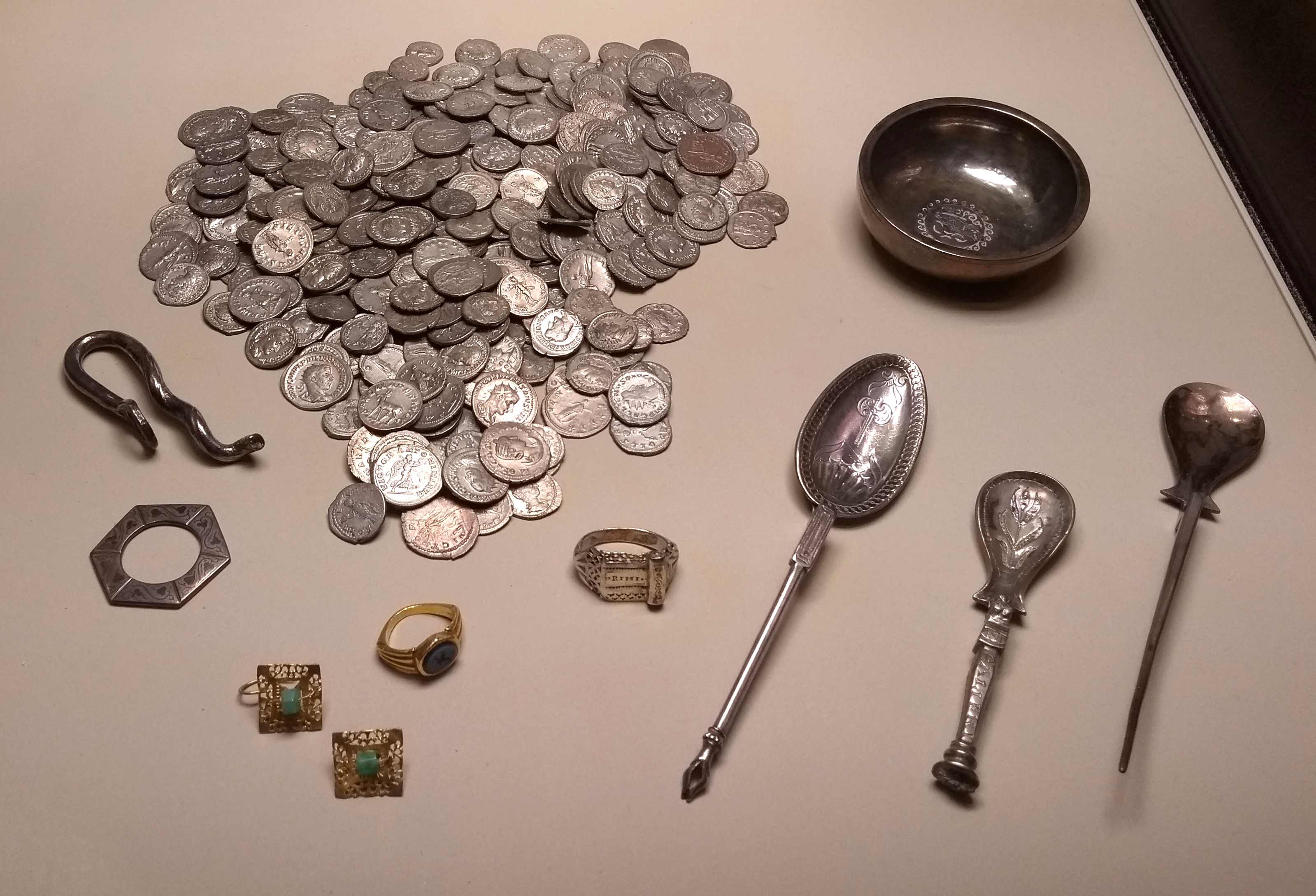 Silberhort aus dem Areal des Xantener Matronentempels (sog. "Tempelschatz") im Rheinischen Landesmuseum Bonn